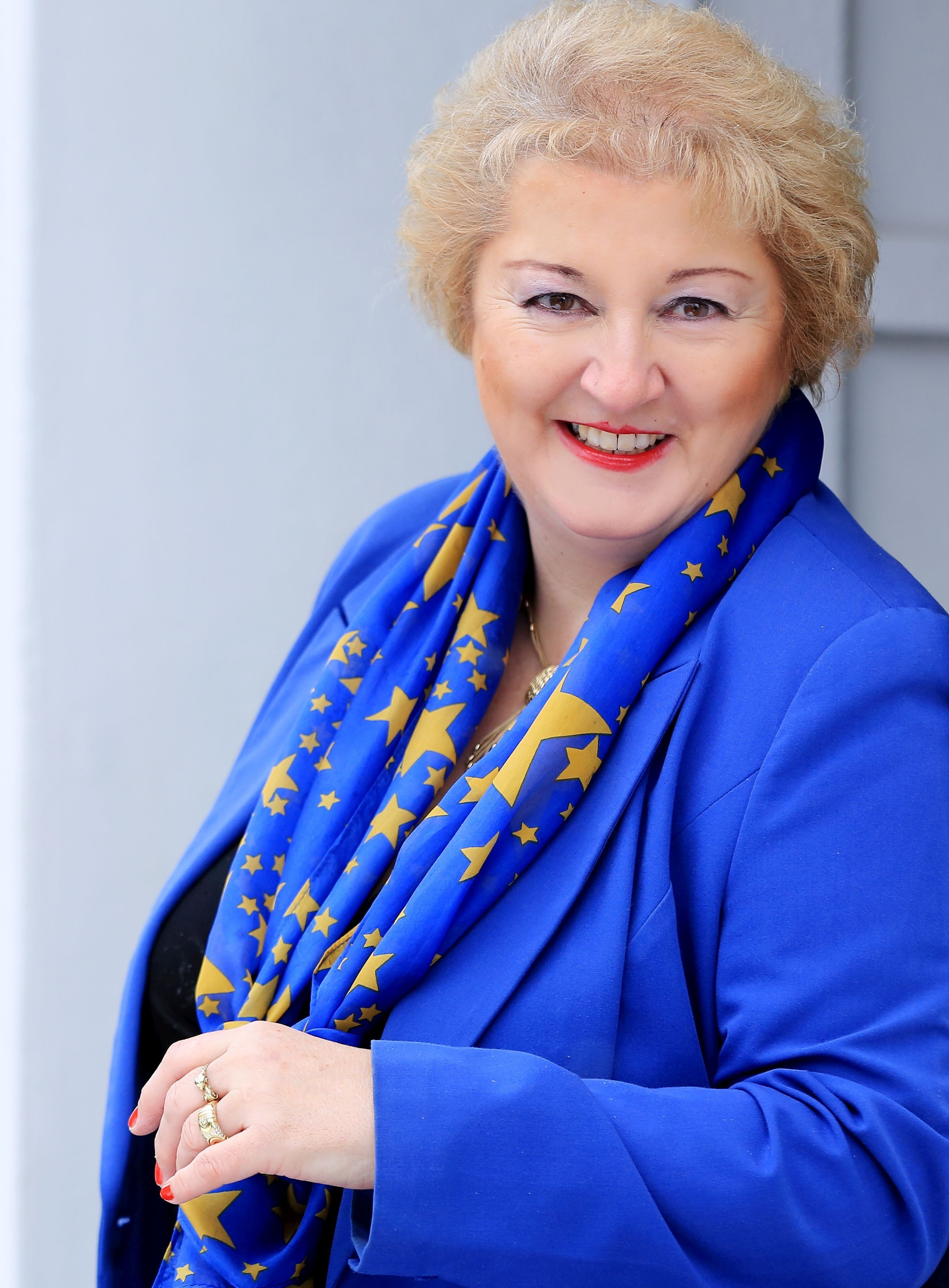 Bild: Katharina Wachtler